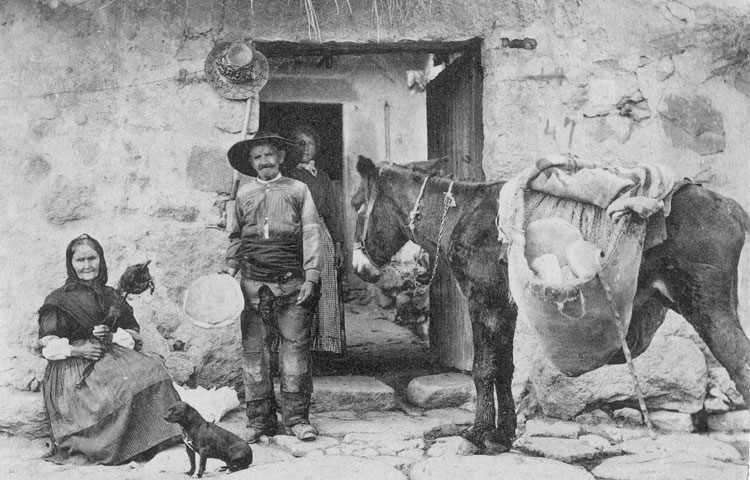 Tipos del país. Escenas de la aldea Ávila - Ávila - Postal 130 x 90 B/N